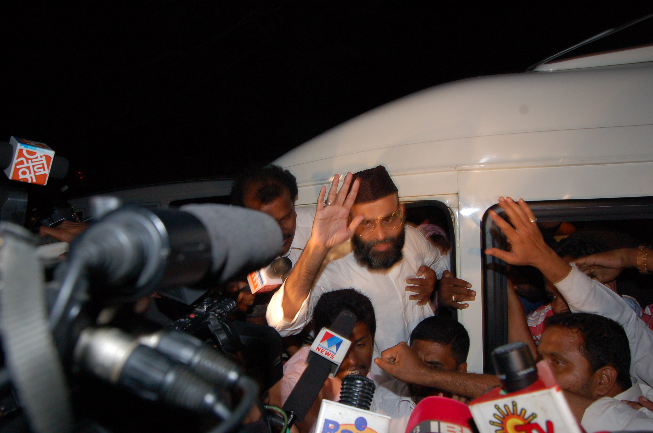 madhni